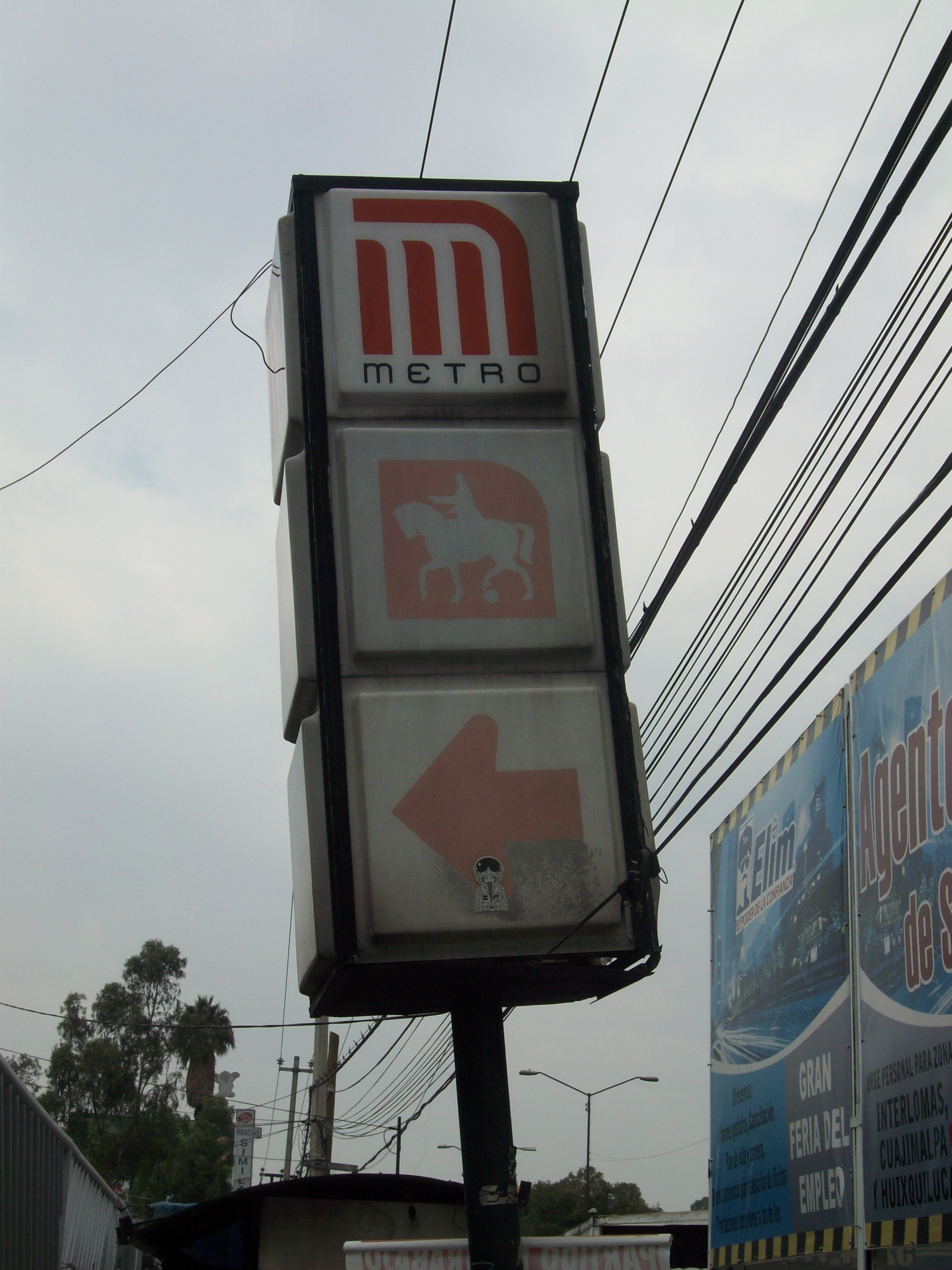 Estela estación Zaragoza